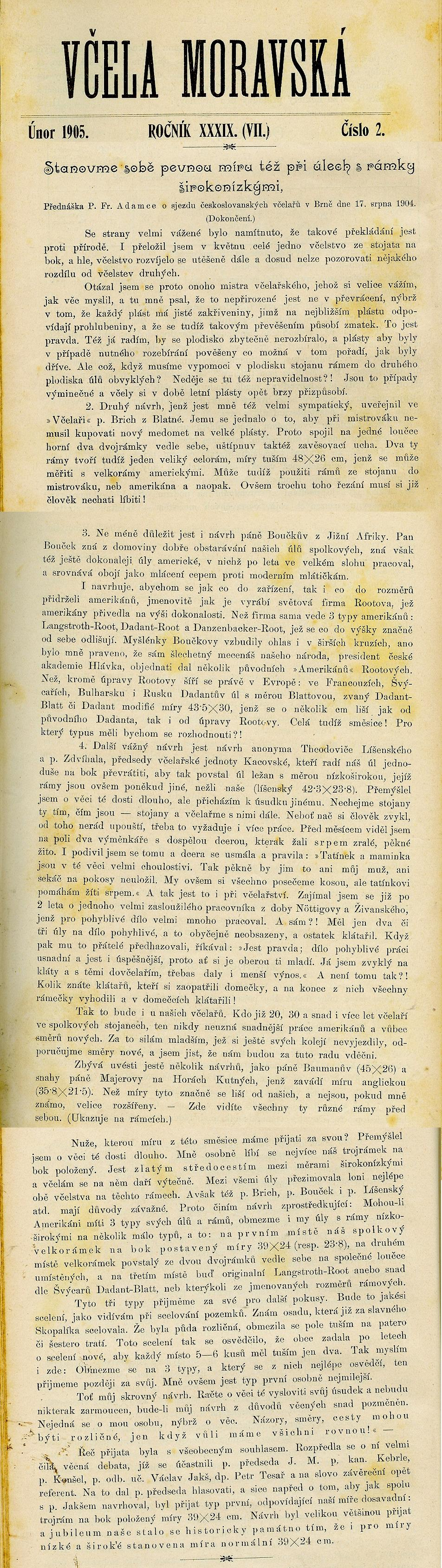 Adamcova míra.